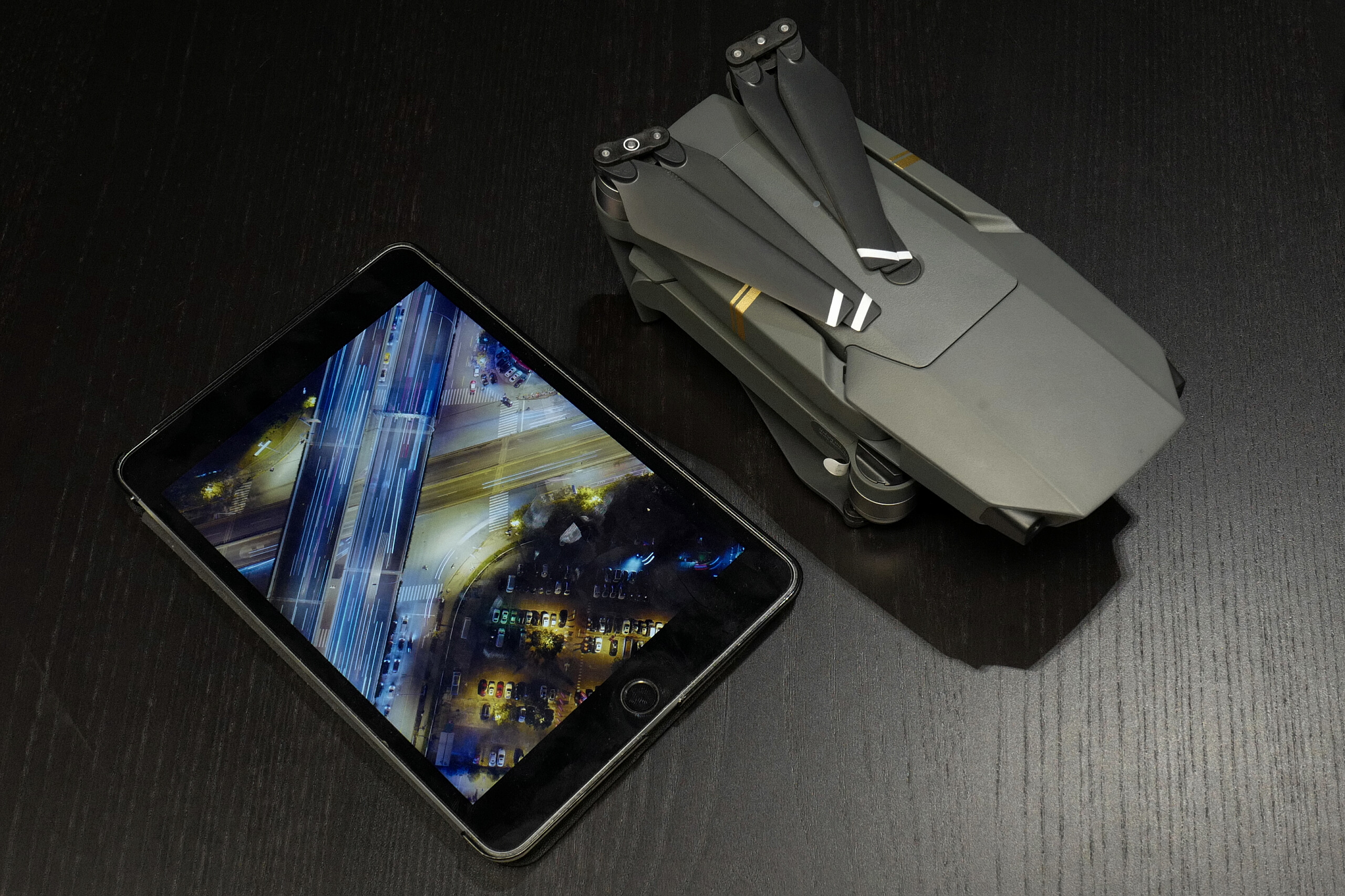 大疆Mavic Pro与一台iPad mini4的对比。